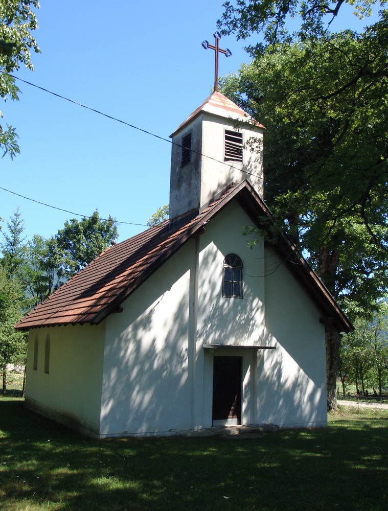 Храм_Покрова_Пресв._Богородице_у_Агином_Селу